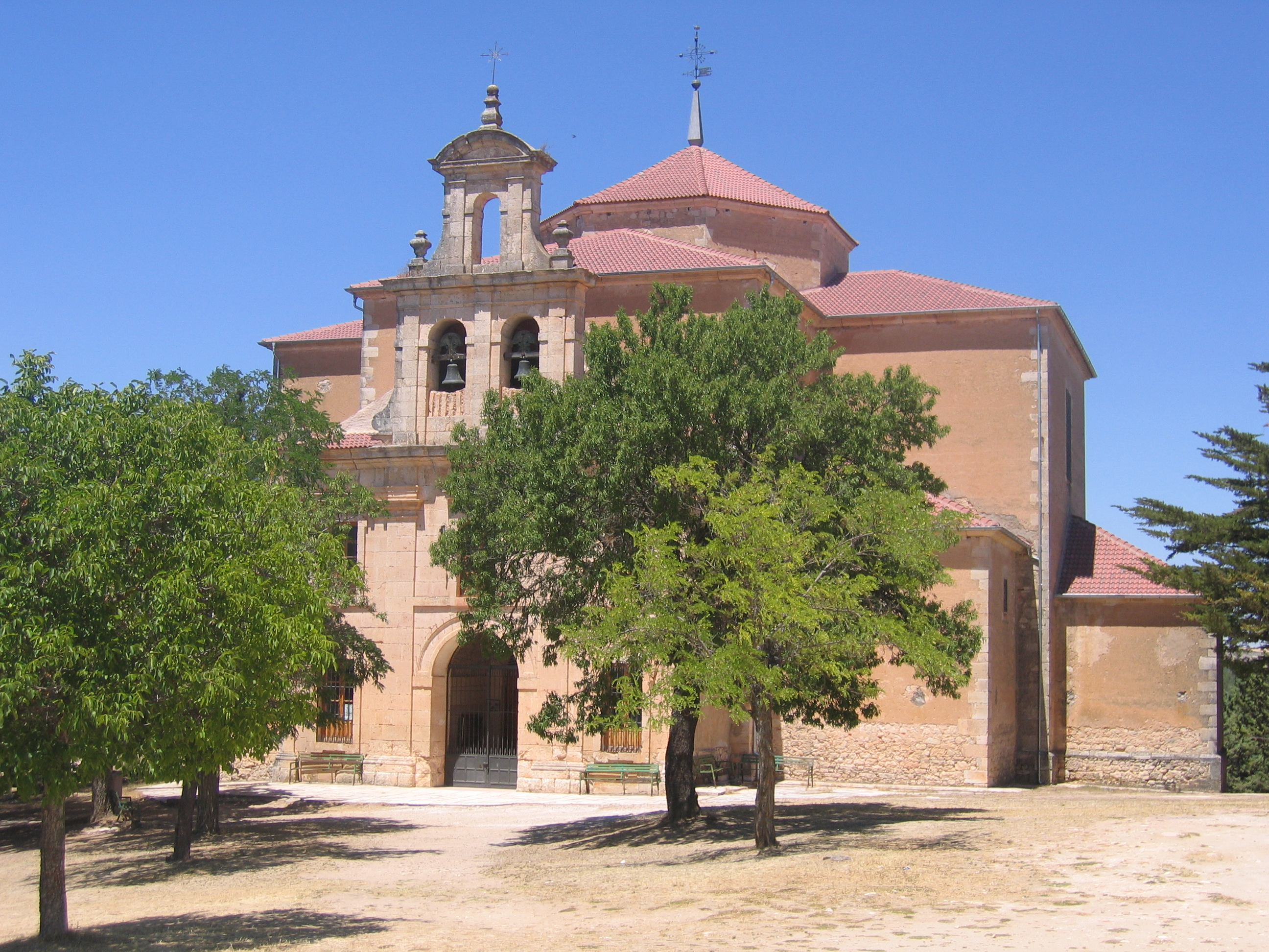 Santuario de Nuestra Señora de Hornuez